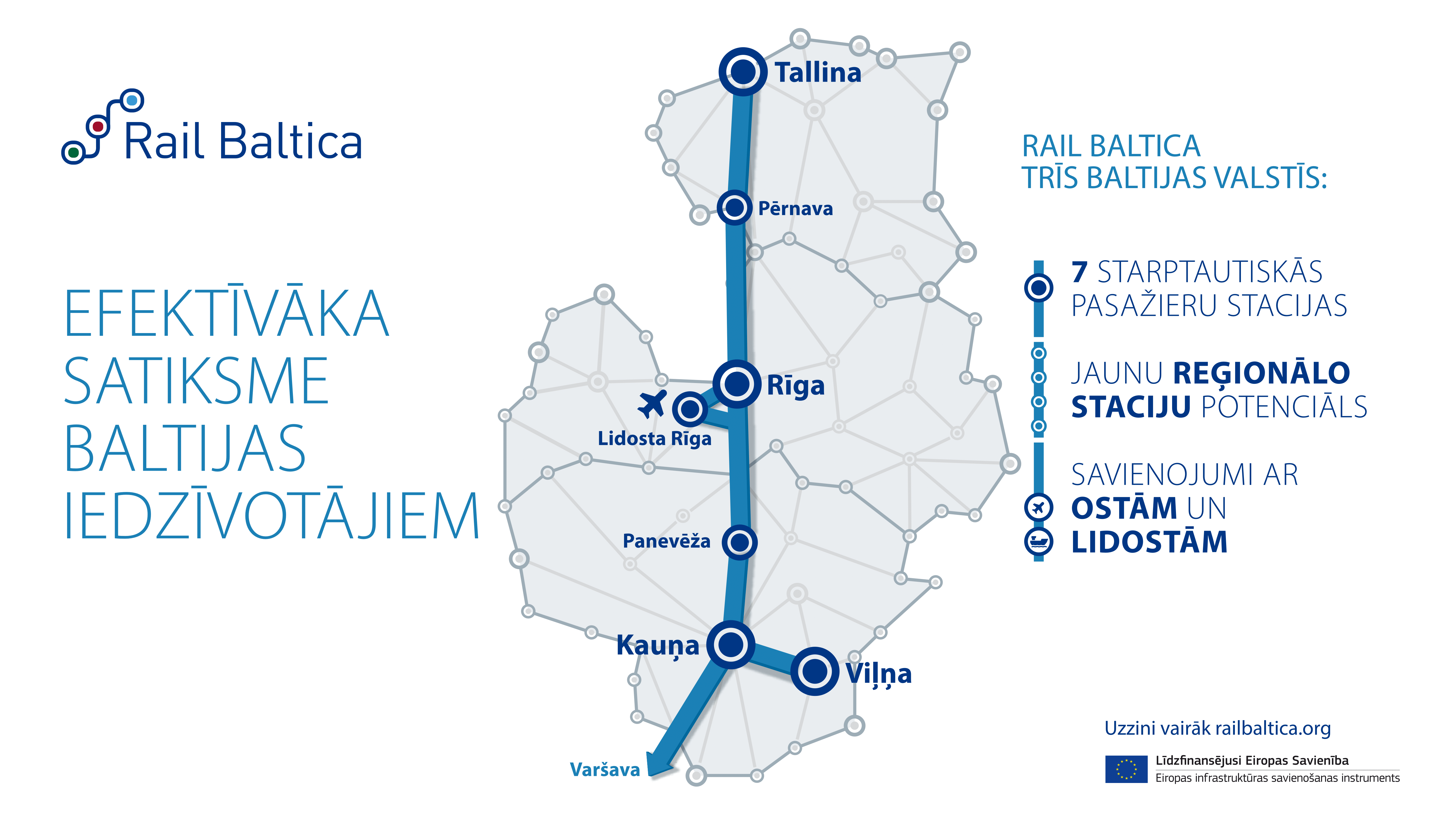 Rail Baltica pasažieru stacijas un maršruts